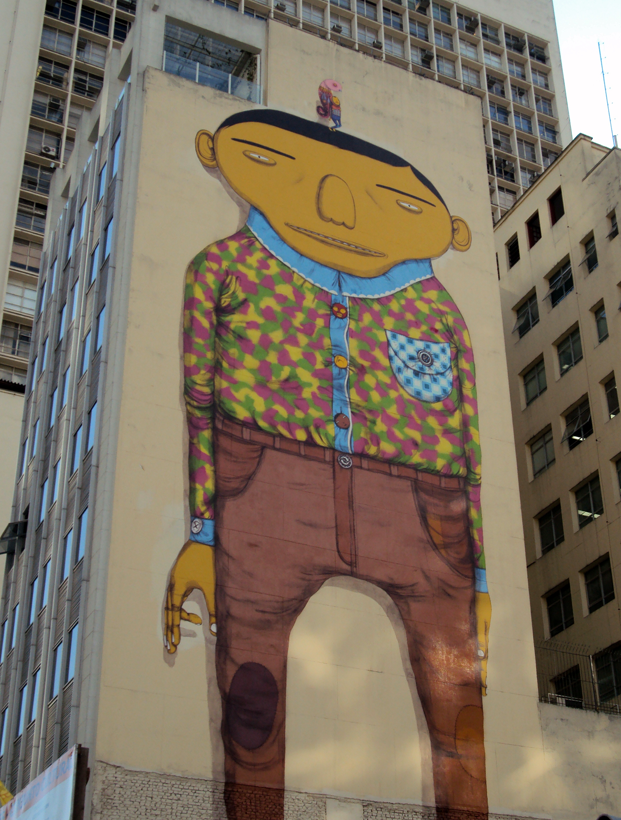 Antigo grafite dos artigos "Os Gêmeos", no Vale do Anhangabaú, em São Paulo, Brasil.